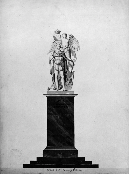 Förslag till Karl XIII:s staty. Penna och bläck, lavering i grått, på papper. Av Erik Gustaf Göthe. Tillhör Nationalmuseum med inventarienummer: NMH 295/1908